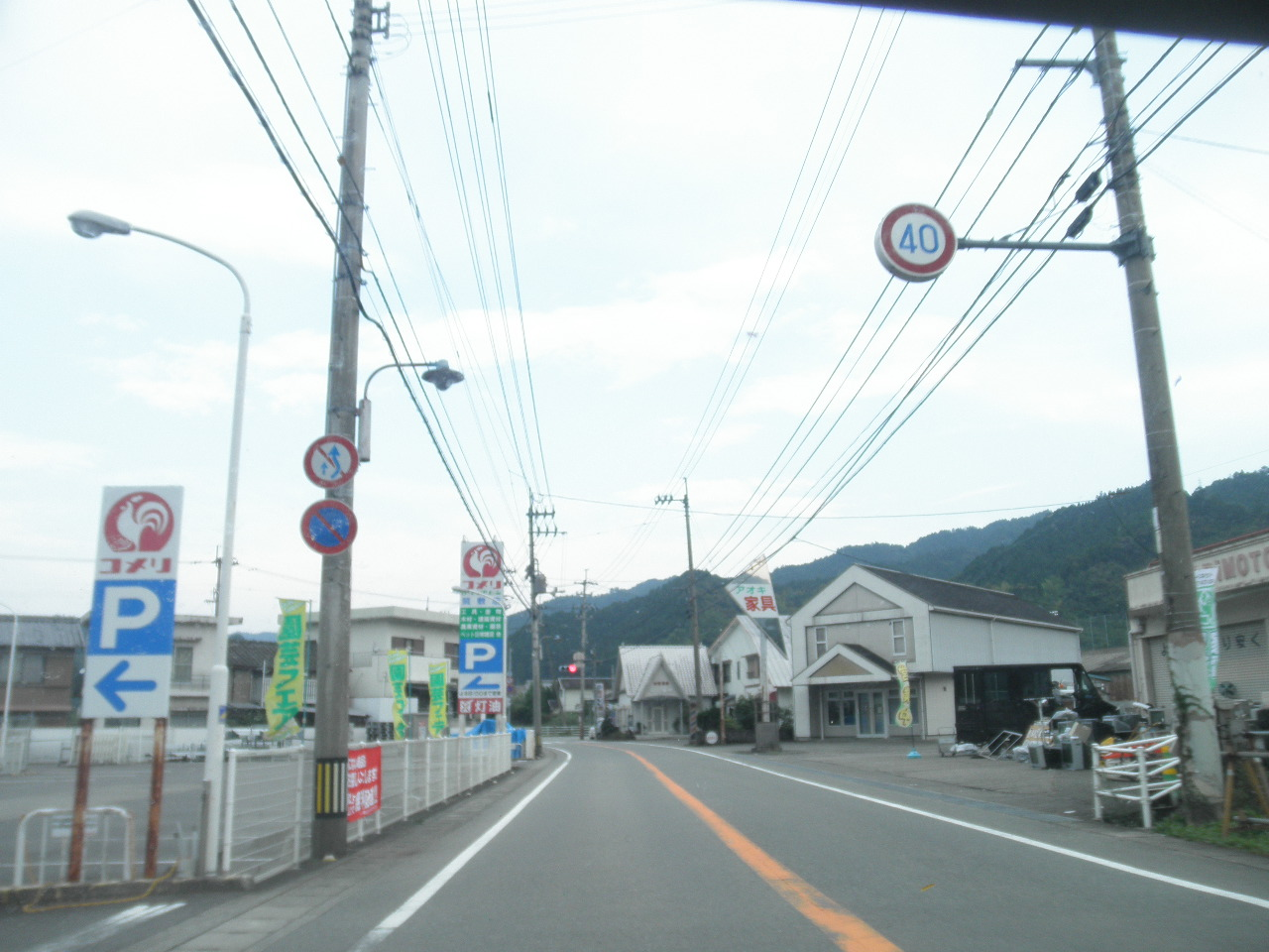 徳島県那賀郡那賀町和食郷南川 国道195号